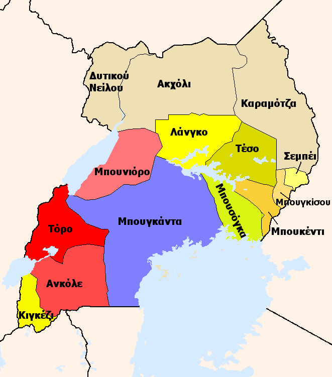 Τα βασίλεια της Ουγκάντας που έγιναν βρετανικά προτεκτοράτα.